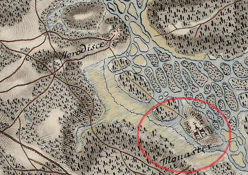 Городище Сокальський район